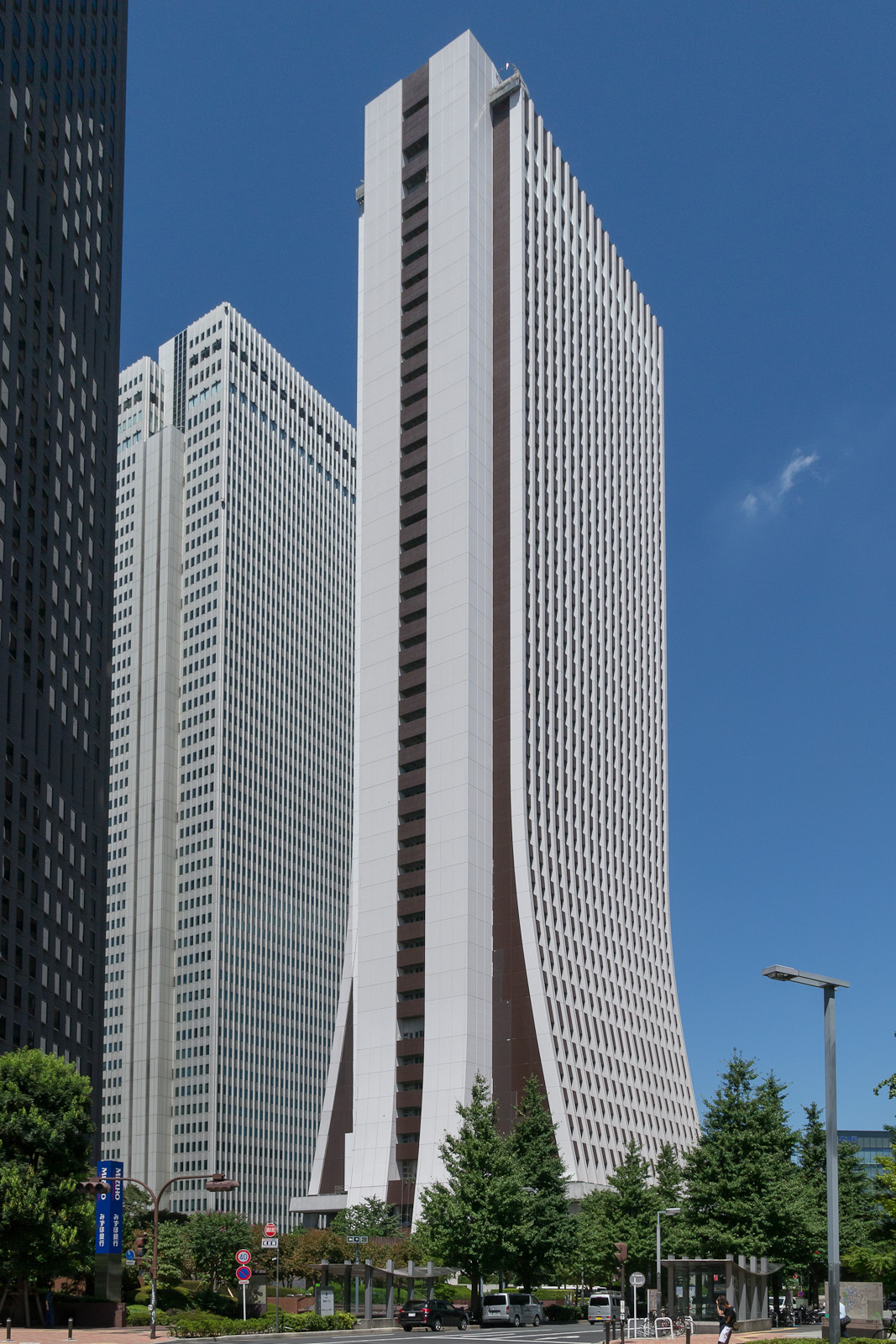 西新宿の損保ジャパンビル。